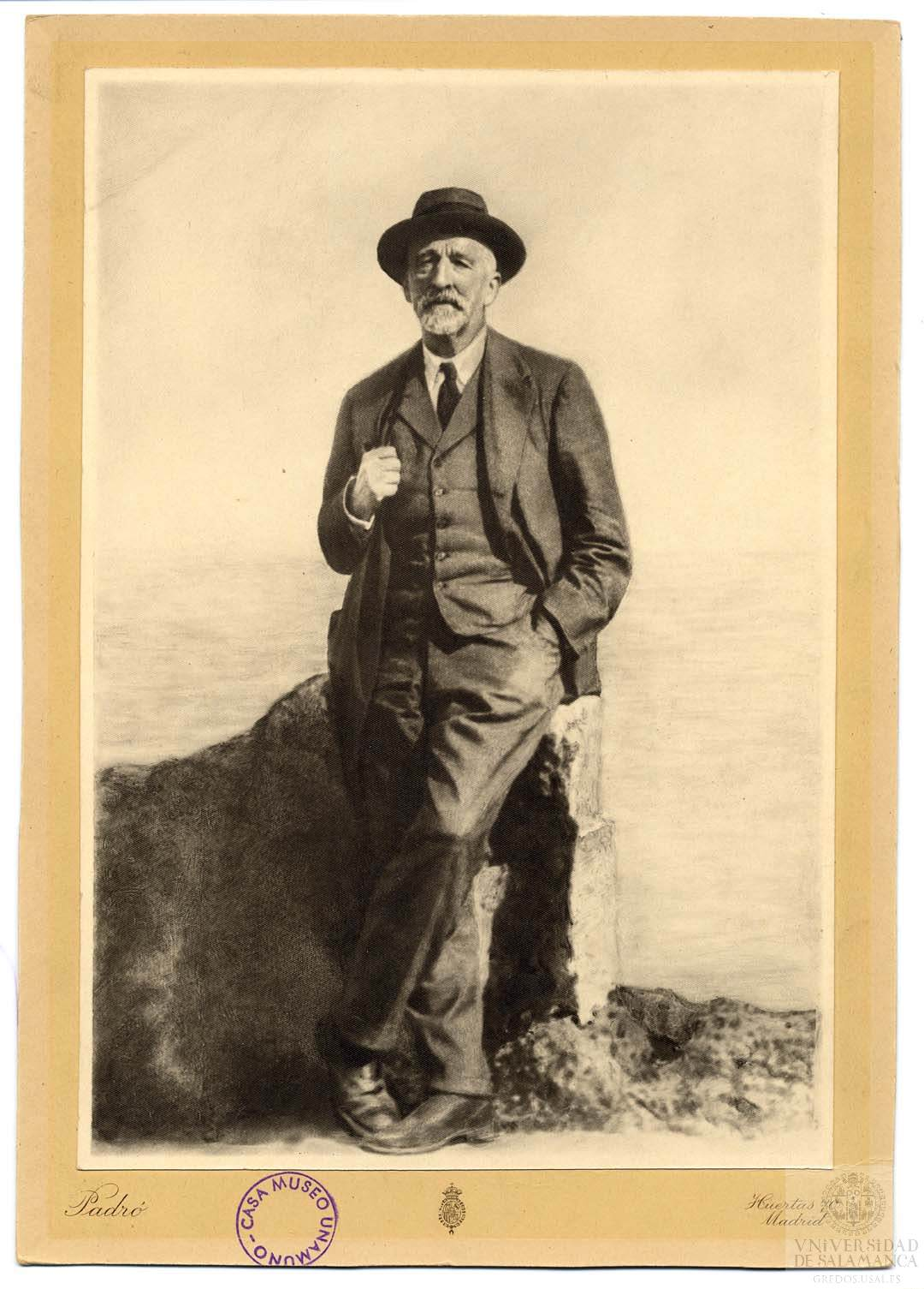 Retrato de Manuel Bartolomé Cossío (1857 - 1935). En la Casa Museo de Unamuno (Repositorio Documental de la Universidad de Salamanca).